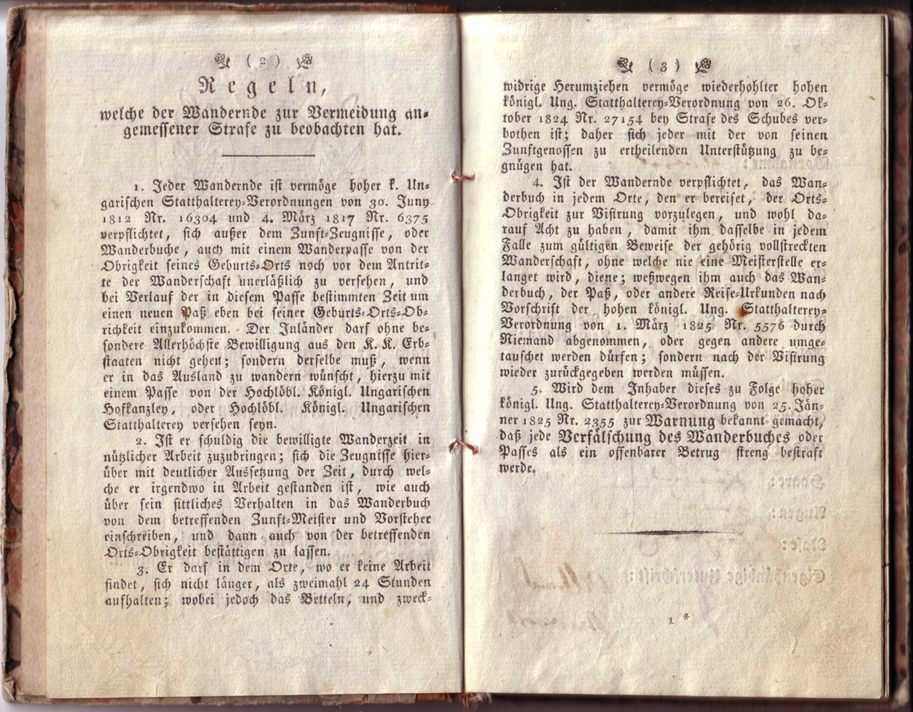 Travelling book of a German-Hungarian furrier. Page 2-3 / Wanderbuch des Kürschnergesellen Albert Strauß, 1816. Seite 2-3 Regeln, welche der Wandernde zur Vermeidung angemnessener Strafe zu beobachten hat. Nro 135 Wanderbuch nach der Hohen Königl. Ungarischen Statthalterey Verordnung vom 16. July 1816 Nro. 21080 die Stelle der gewöhnlichen Kundschaften vertrettend. Für Albert Strauß Kürschner Geselle Von dem Magistrate der Königl. Freystadt Oedenburg im Königreiche Ungarn. (32 paginierte Blätter enthaltend.)